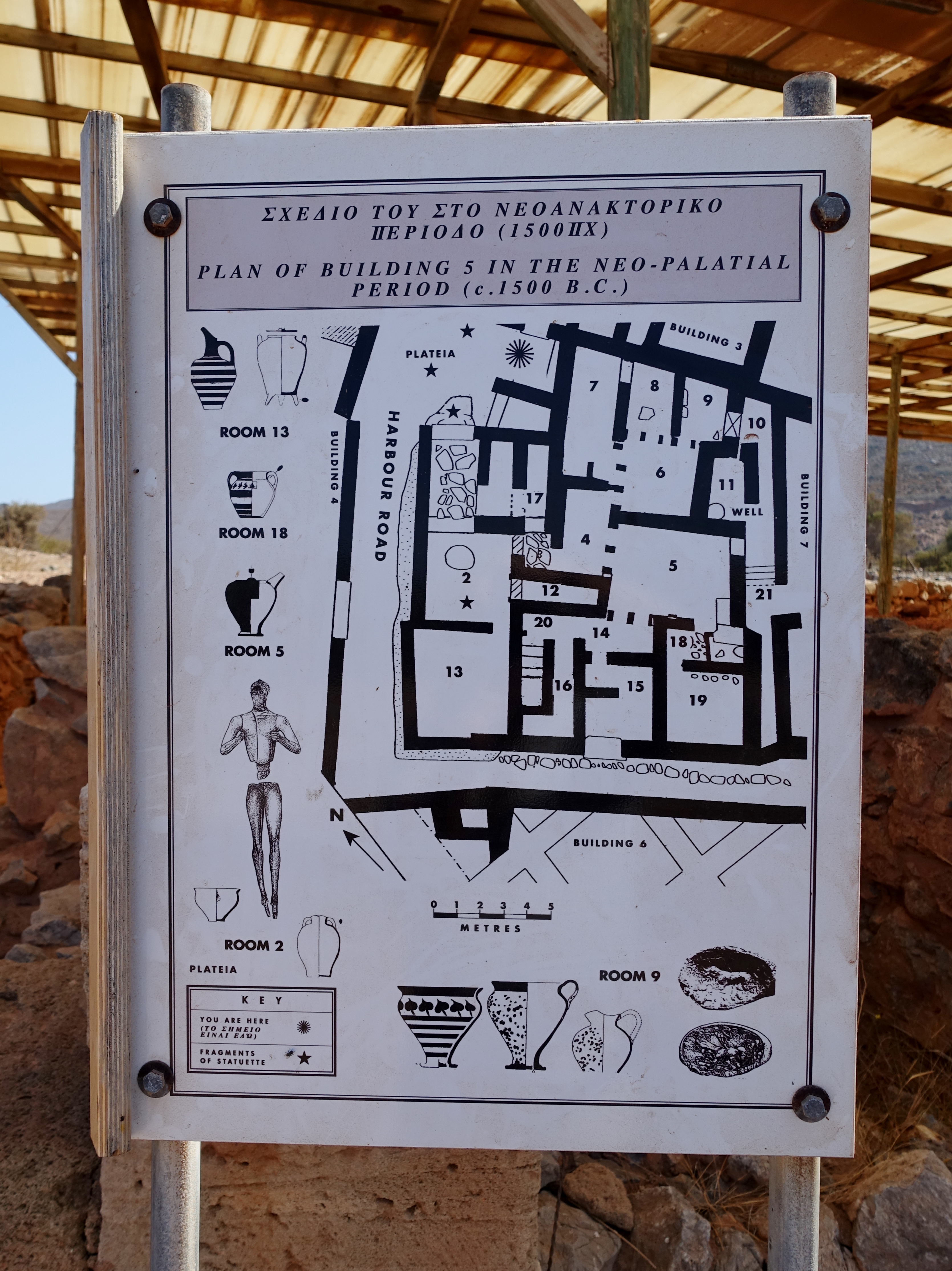 Hinweistafel vor Haus 5 der Ausgrabungsstätte von Roussolakkos (Ρουσσόλακκος) nahe Palekasto, Gemeinde Sitia, Kreta, Griechenland